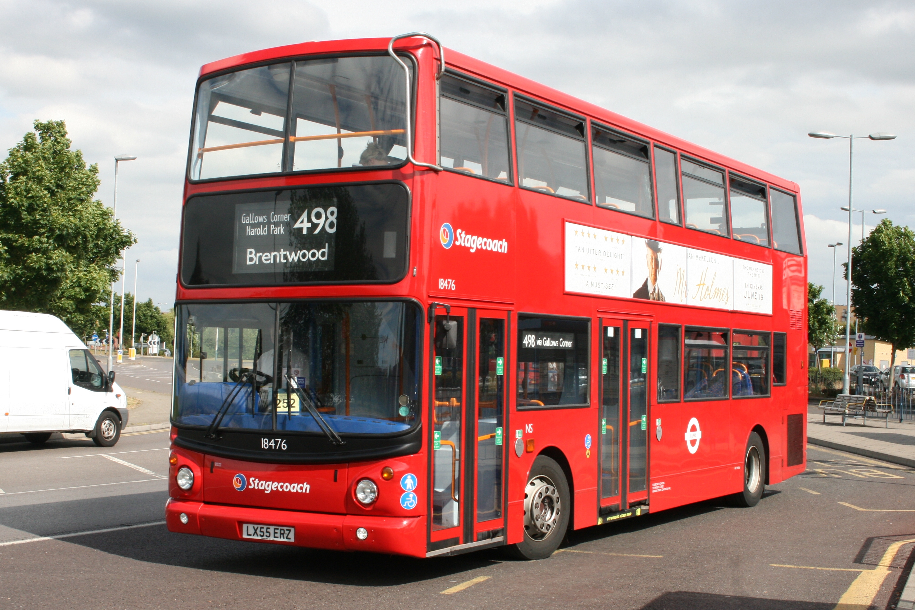 LX55 ERZ